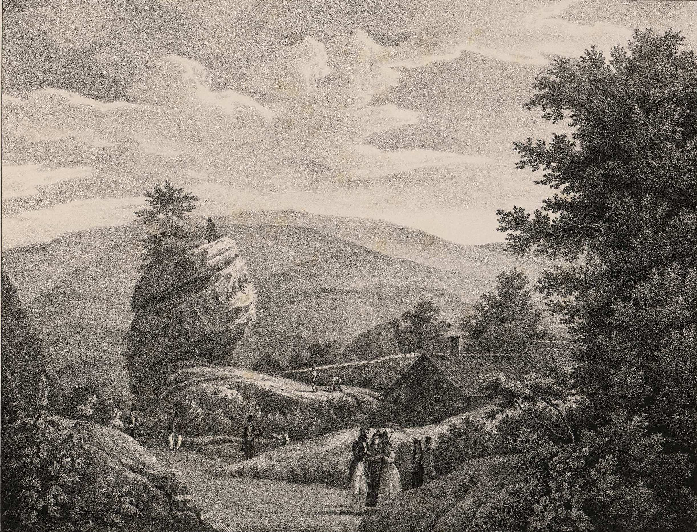 [Vista del jardín llamado Robledo] [Material gráfico] / F. Brambilla lo pintó ; J. de Madrazo lo dirigió ; Asselineau lo litº